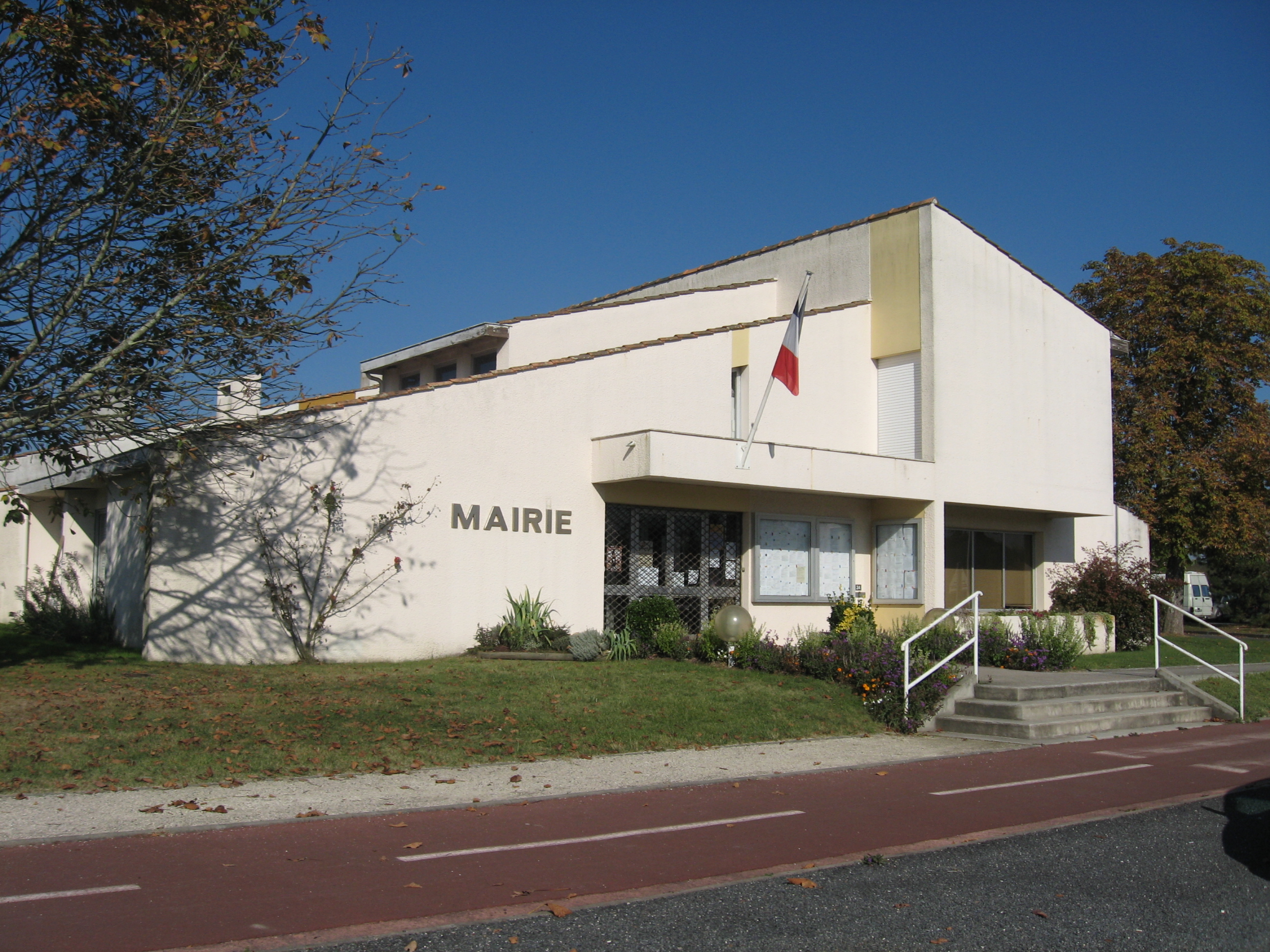 Mairie de Carignan-de-Bordeaux